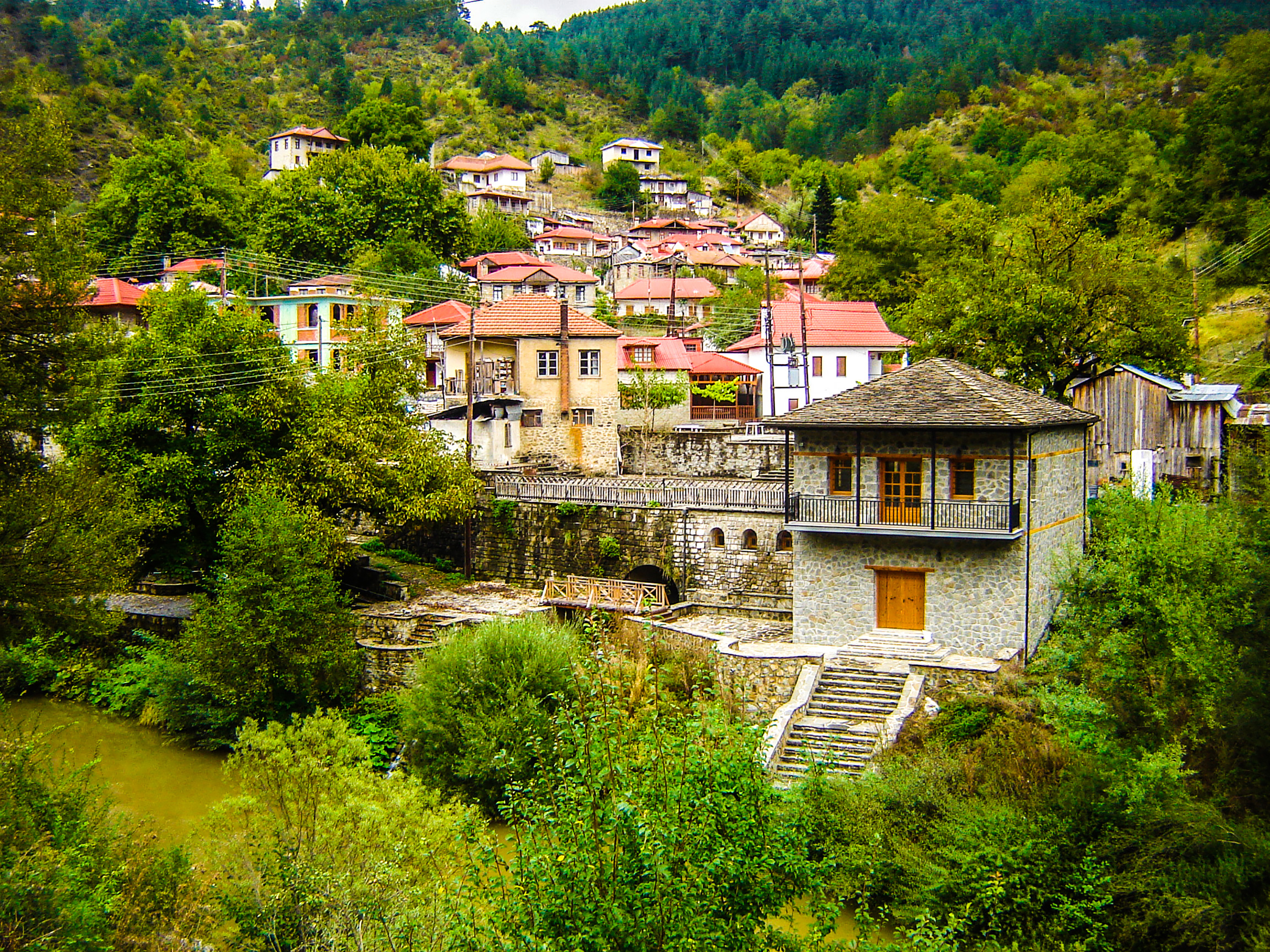 Η ομορφιά της οροσειράς, η χλωρίδα και η πανίδα. This is a photography of Natura 2000 protected area with ID Εθνικός Δρυμός. Πίνδος. Εθνικός Δρυμός.